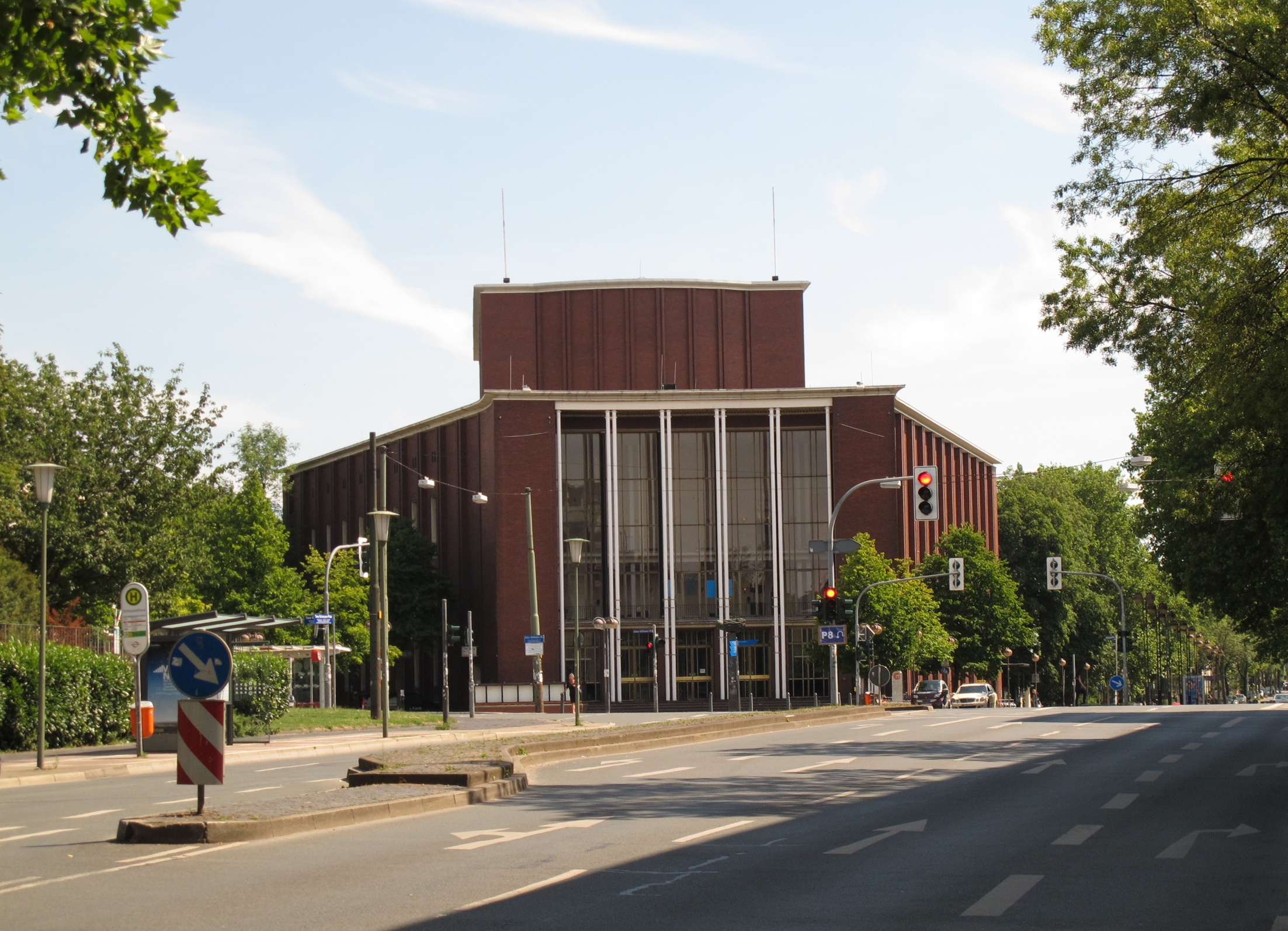 Das Schauspielhaus Bochum gehört zu den führenden Sprechtheatern deutscher Sprache.